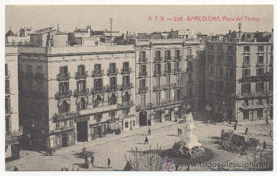 Plaça del Teatre, a les Rambles